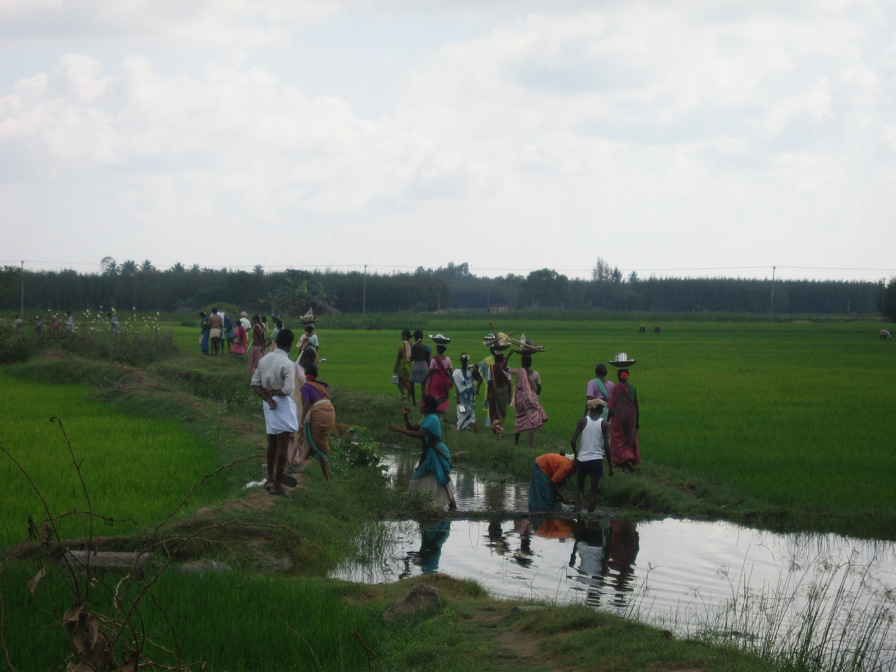 தமிழ்நாட்டுக் கிராமத்தில் விவசாயத் தொழிலாளர்கள்.